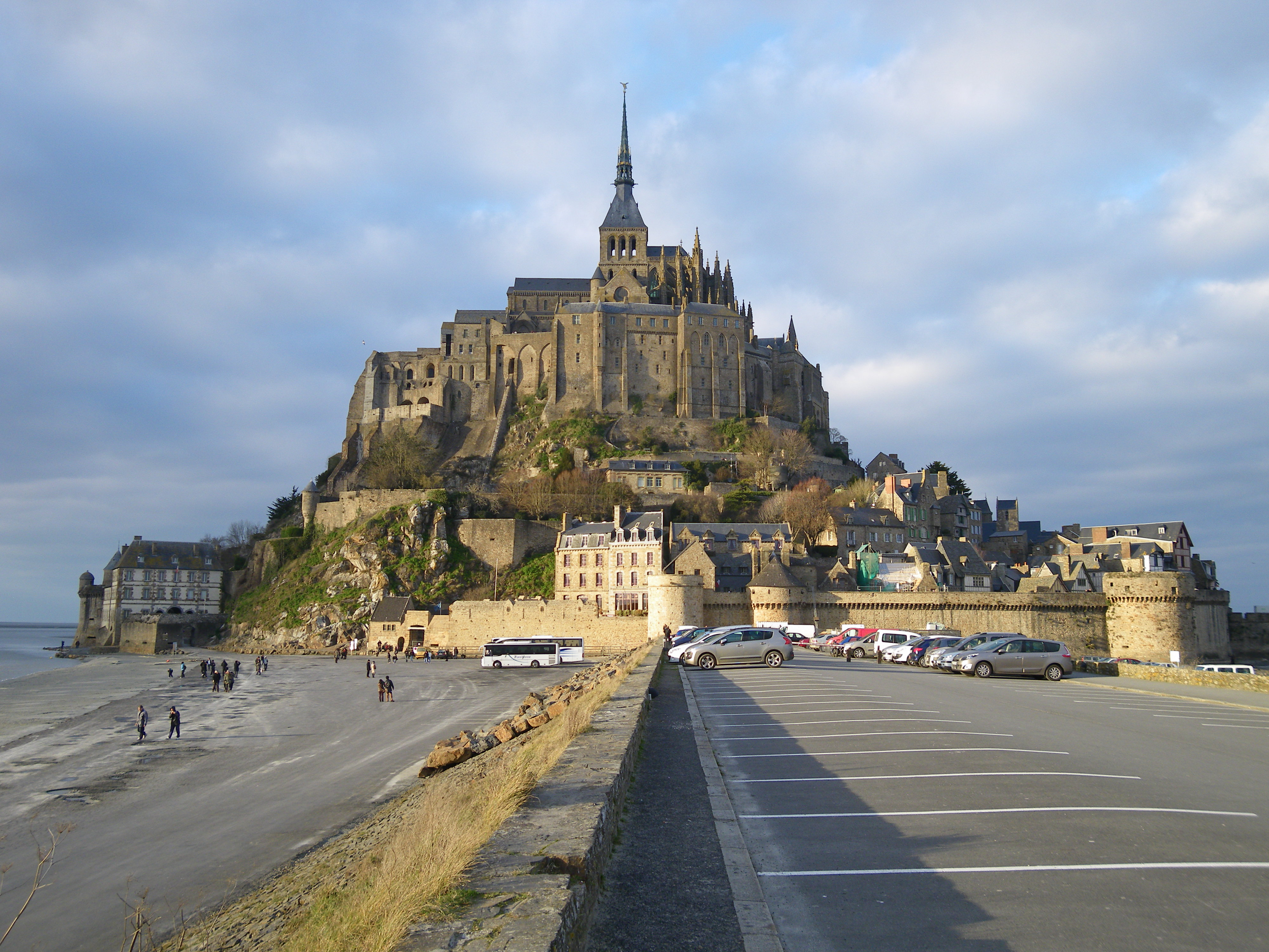 le mont st michel